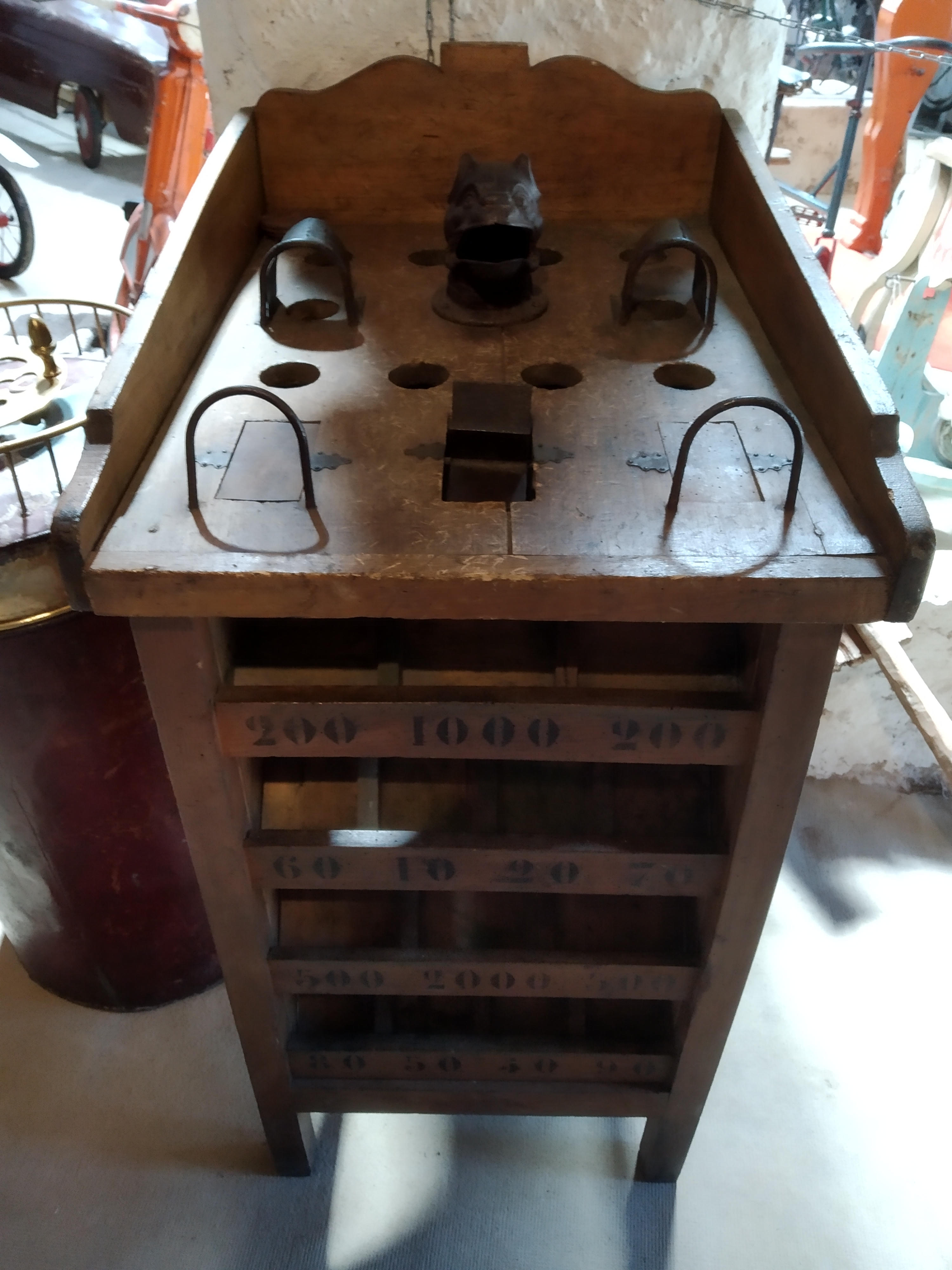 Igel-tokan jokatzeko mahaia, Nafarroako Erresumako Museo Etnografikoan